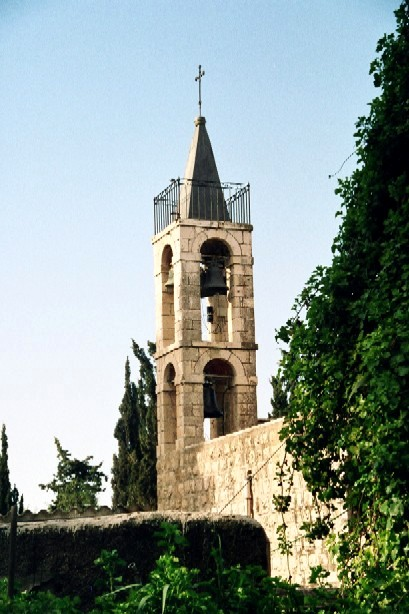 מגדל הפעמון של מנזר סן-סימון, קטמון.